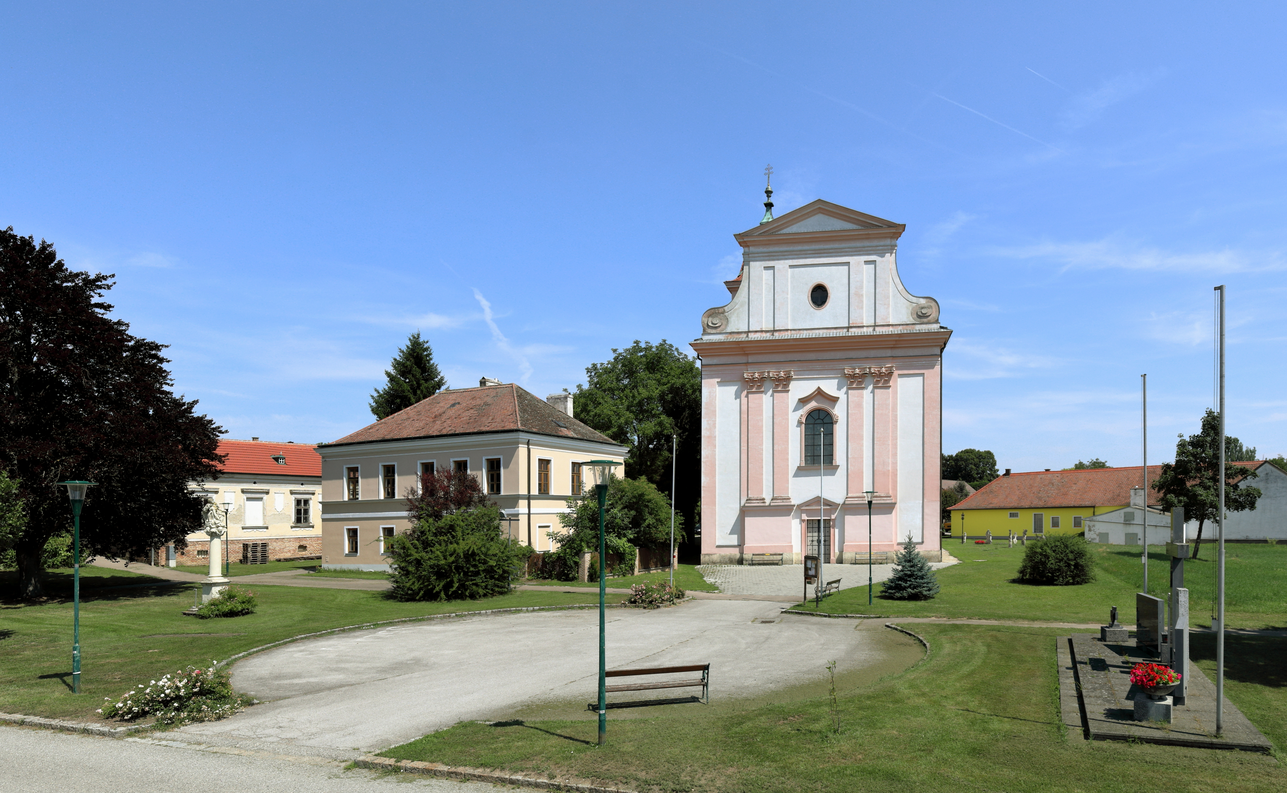 Ortszentrum von Großstelzendorf, ein Ortsteil der niederösterreichischen Marktgemeinde Göllersdorf, mit der röm.-kath. Pfarrkirche hl. Andreas, dem Kriegerdenkmal und einem Pietà-Bildstock sowie der ehemaligen Schule.